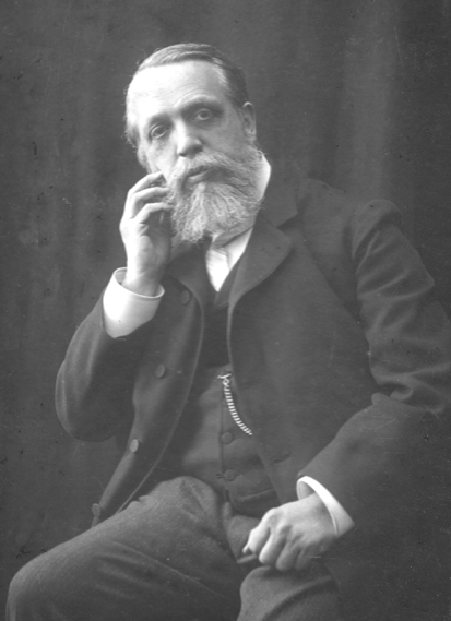 Prof. Dr. Ferdinand Kattenbusch